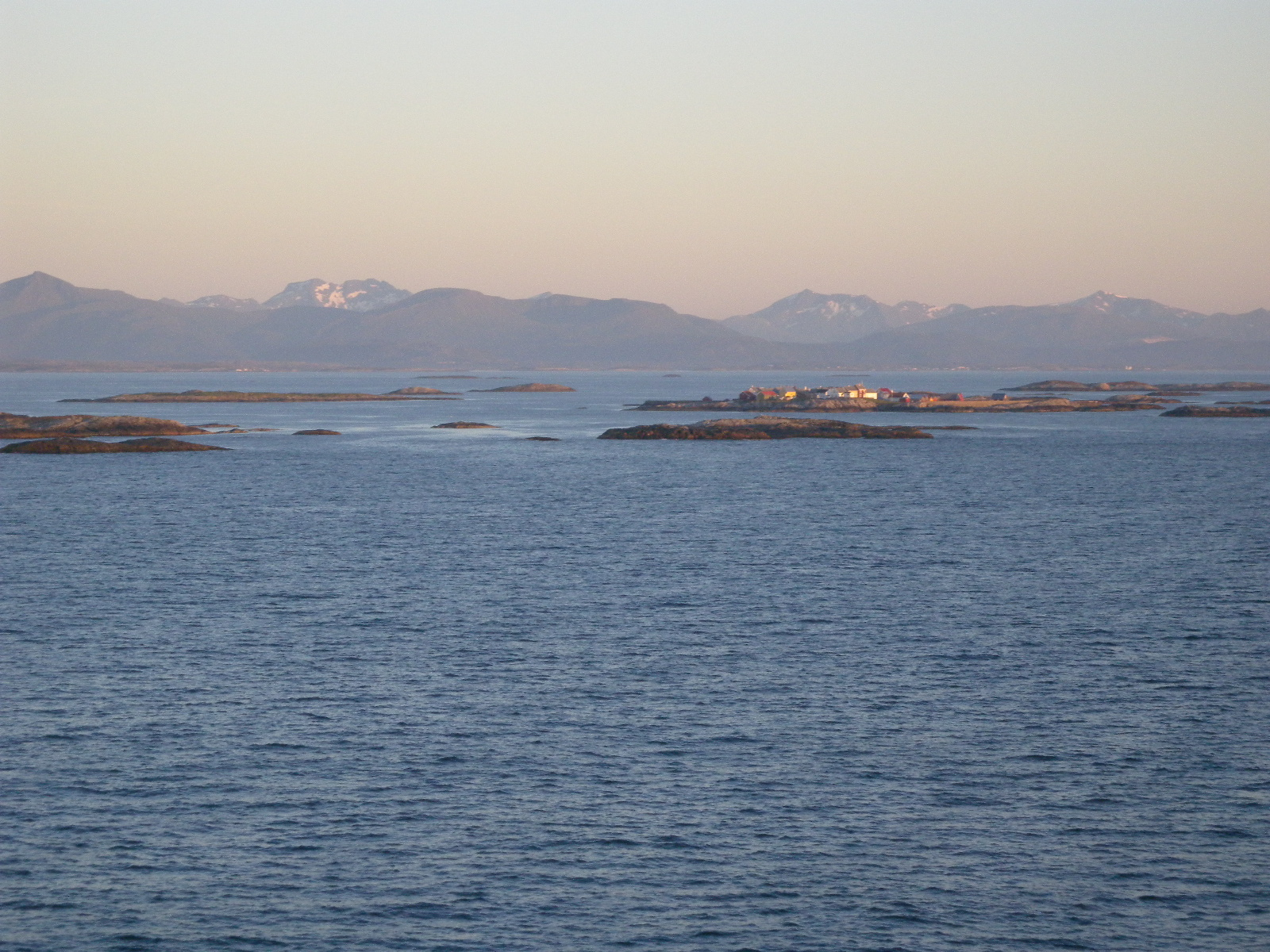 Fiskeværet Grip